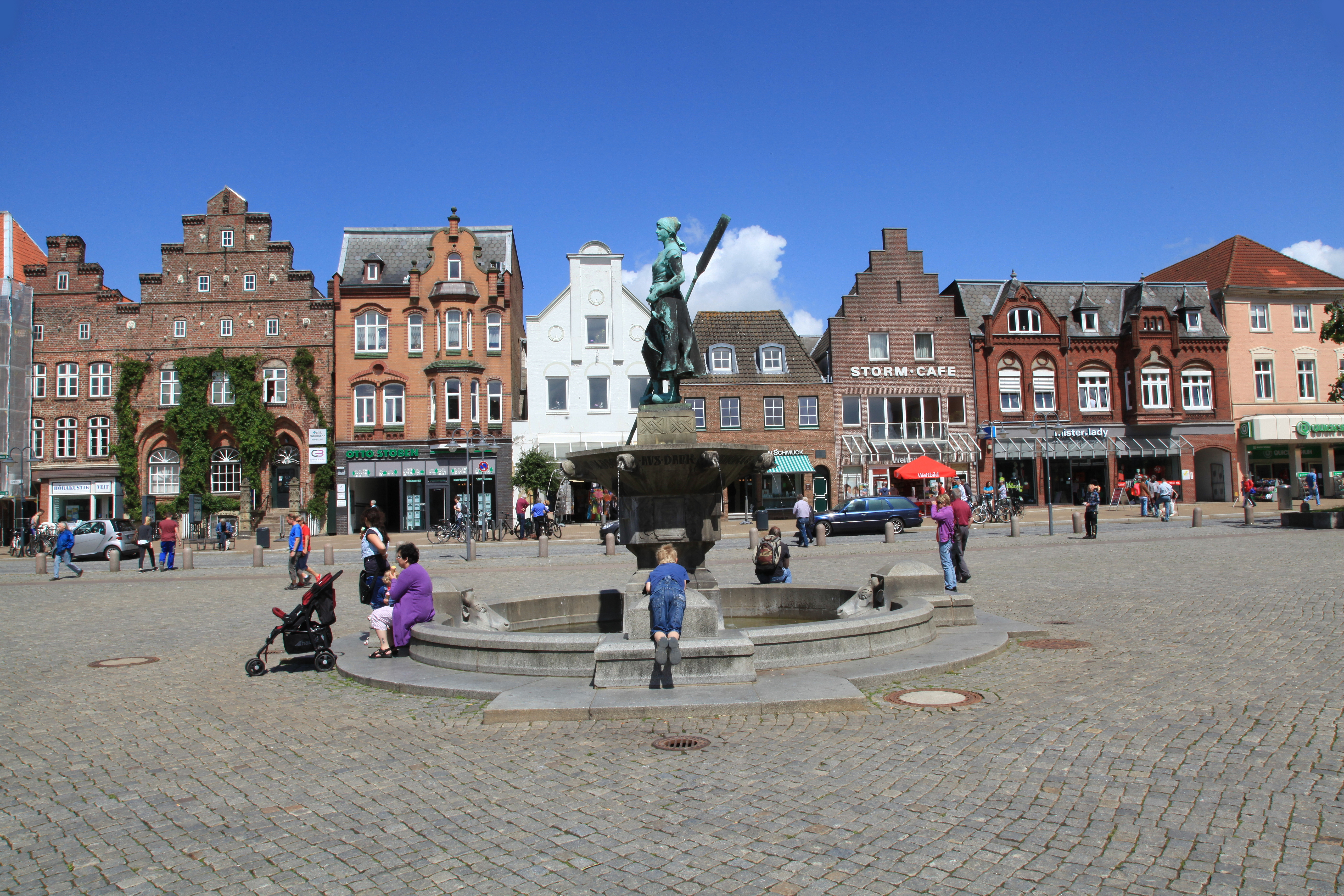 Tine-Brunnen auf dem Markt in Husum